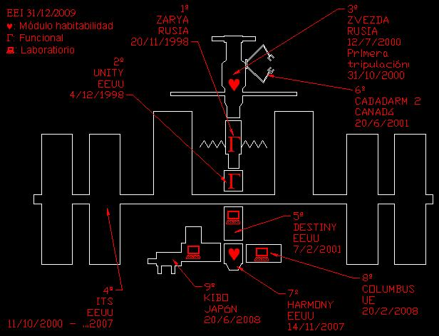 Esquema del montaje de la EEI con las fechas y los nombres y nacionalidades de los módulos principales